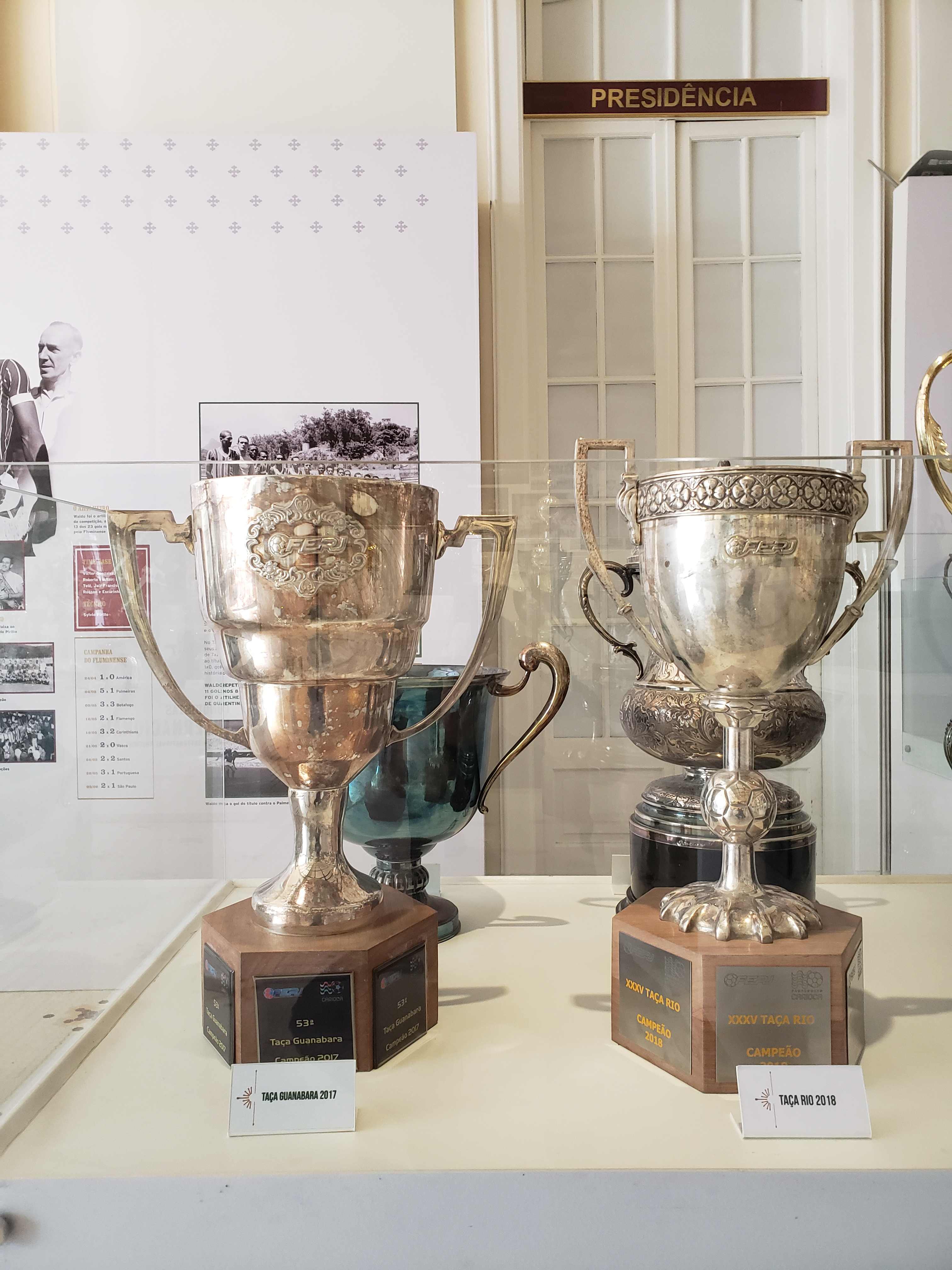 Taça Guanabara 2017 e Taça Rio 2018, conquistadas pelo Fluminense Football Club.